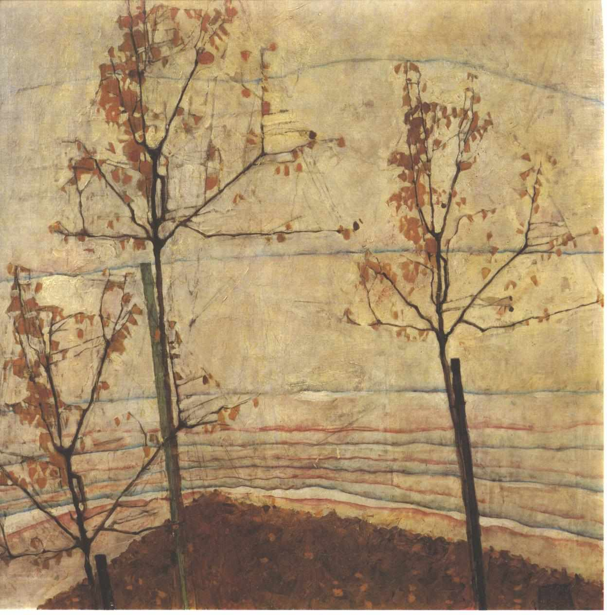 Trees in autumnlabel QS:Len,"Trees in autumn" label QS:Lde,"Herbstbäume"